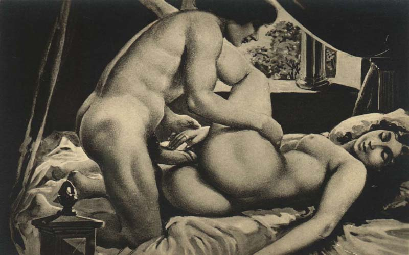 Ilustrações para les Sonnets luxurieux (1892) de Pietro Aretino.